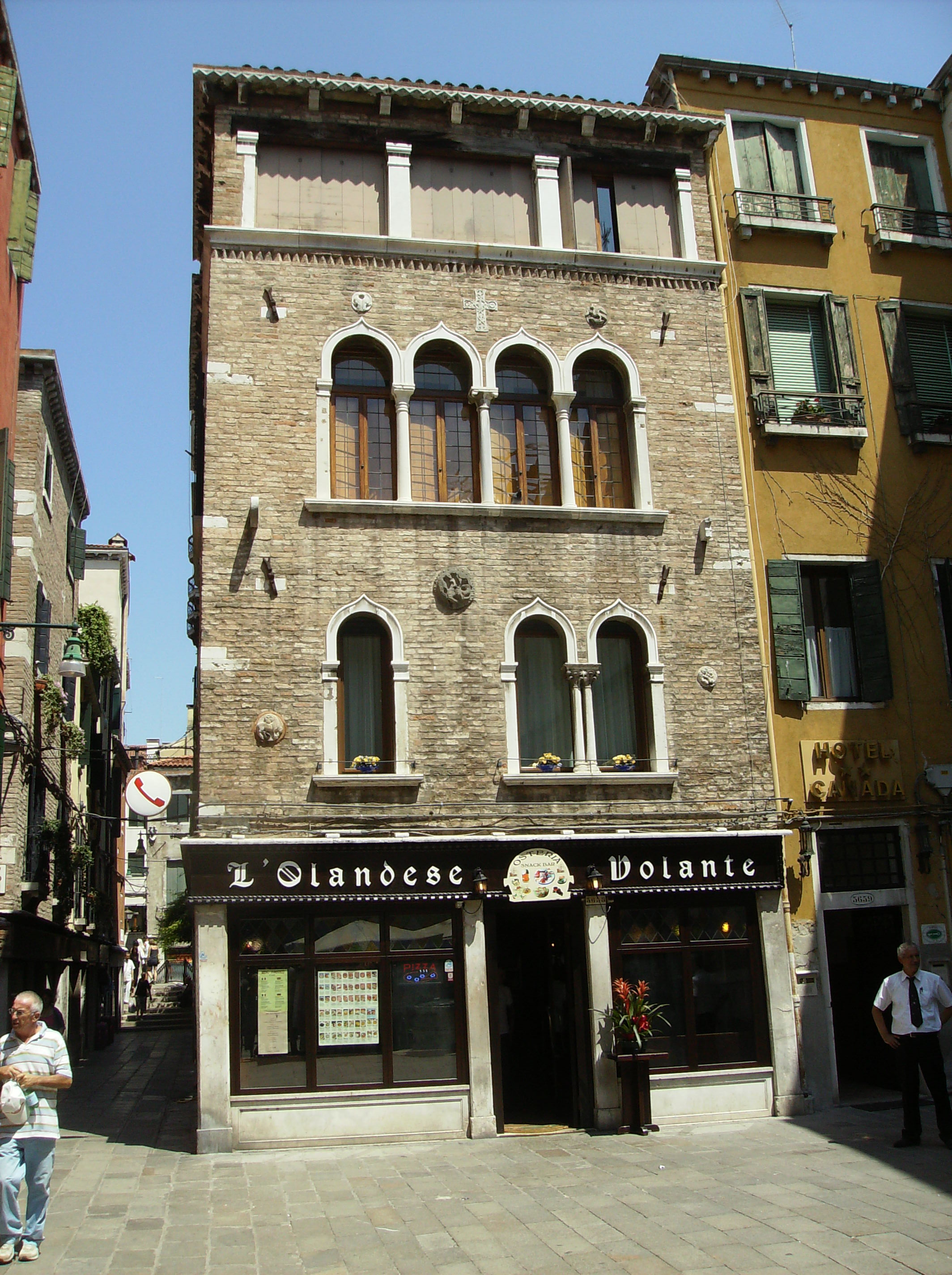 Venise-Campo San Lio-Calle Carminati